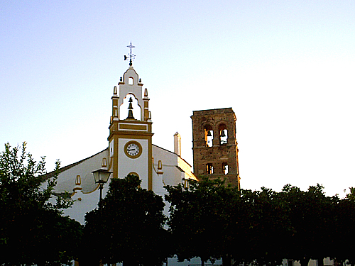 Vista de la Plaza de España, Guadalcanal (Sevilla), con las torres de la iglesia de fondo.